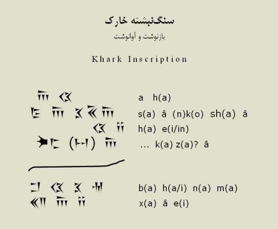 متن کتیبه خارک برگرفته از سایت گردشگری تروارس